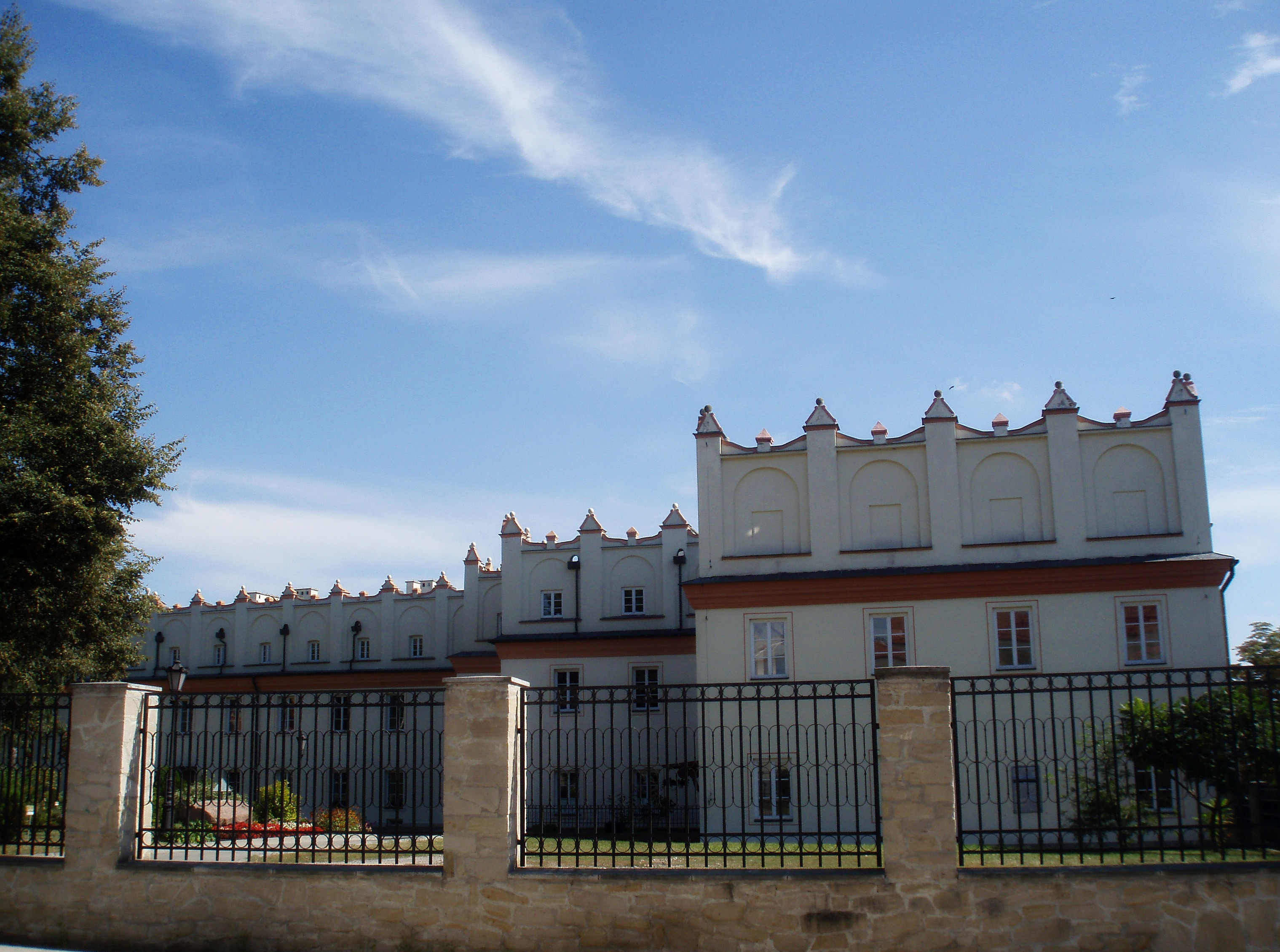 Kolegium jezuickie "Collegium Gostomianum" w Sandomierzu. 728 z 20.05.1967.